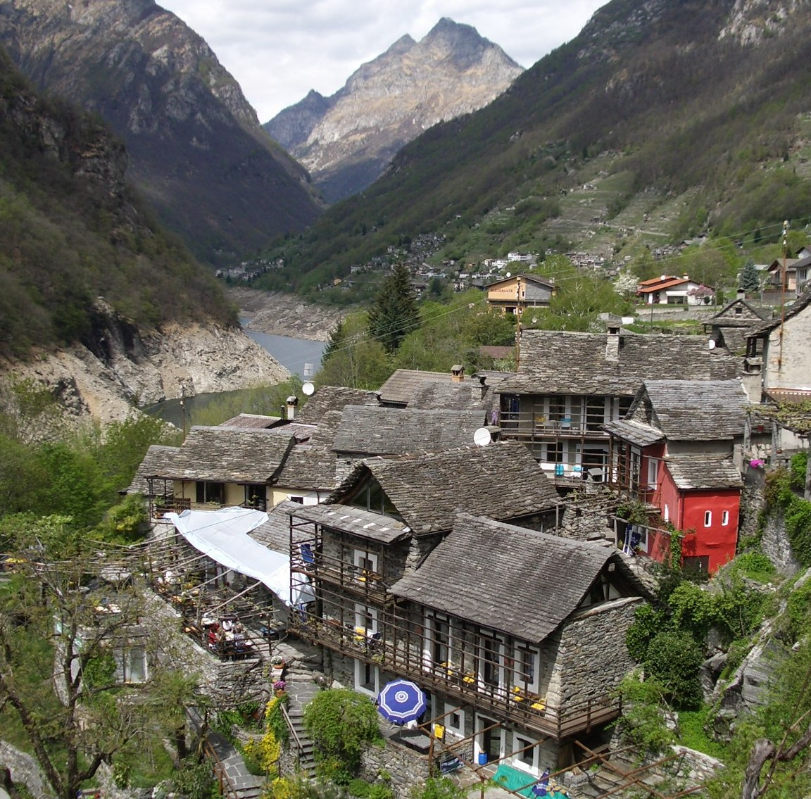 Berzona/Vigorno, Valle Verzasca, Switzerland self-made, May 2006